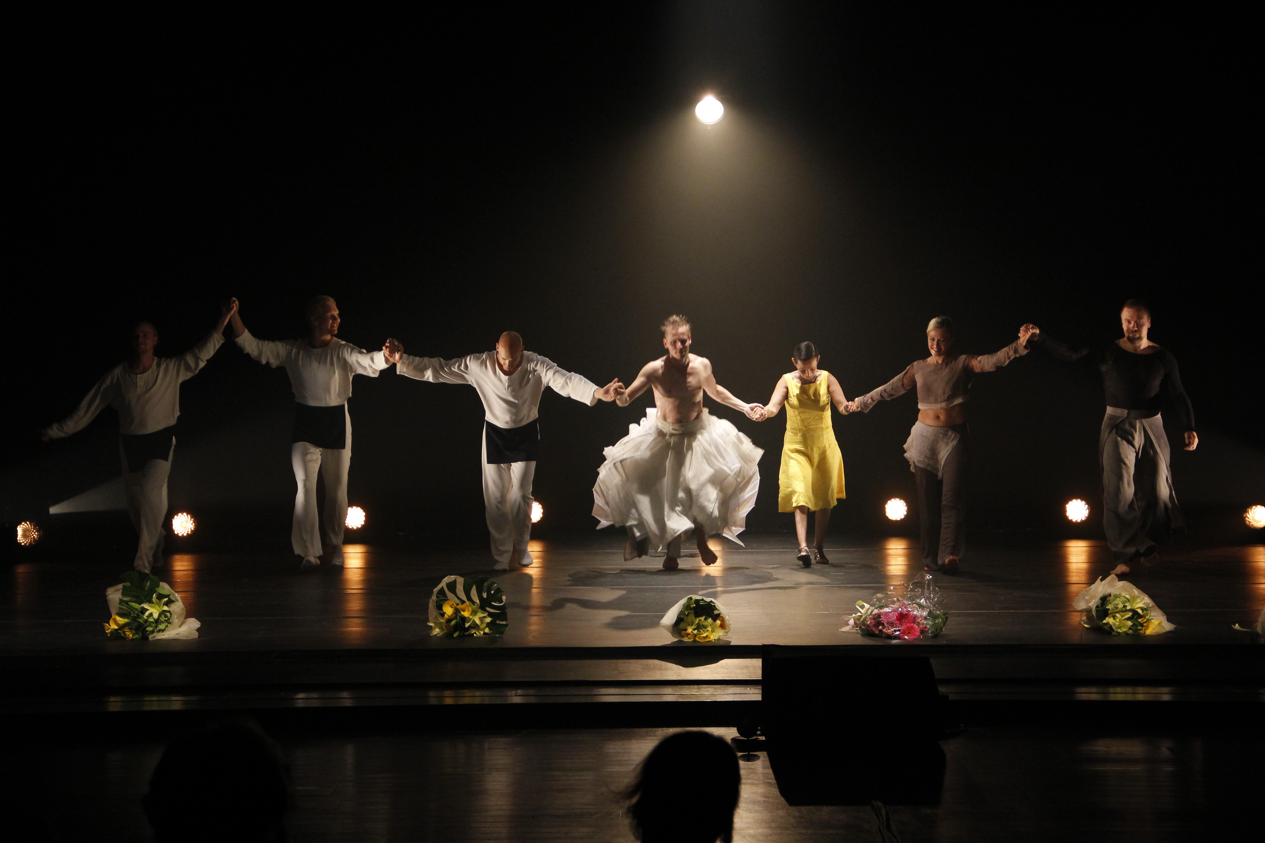 Taking a bow following a performance of Tero Saarinen Company's Triple bill at Bard SummerScape in July 2011, The Fisher Center in New York, USA